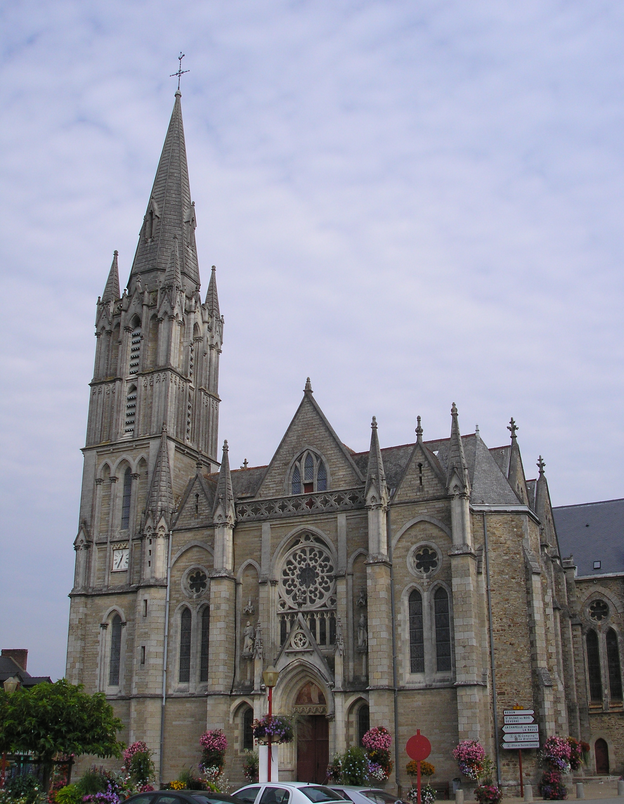 Missillac (Pays de Loire, France). L'église.